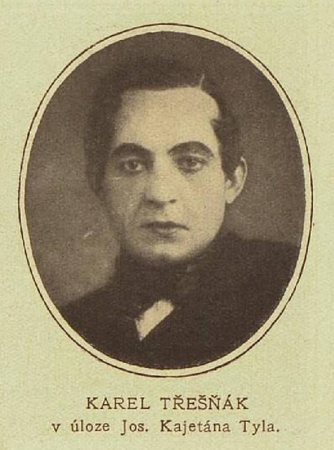 Karel Třešňák, český divadelní herec a režisér